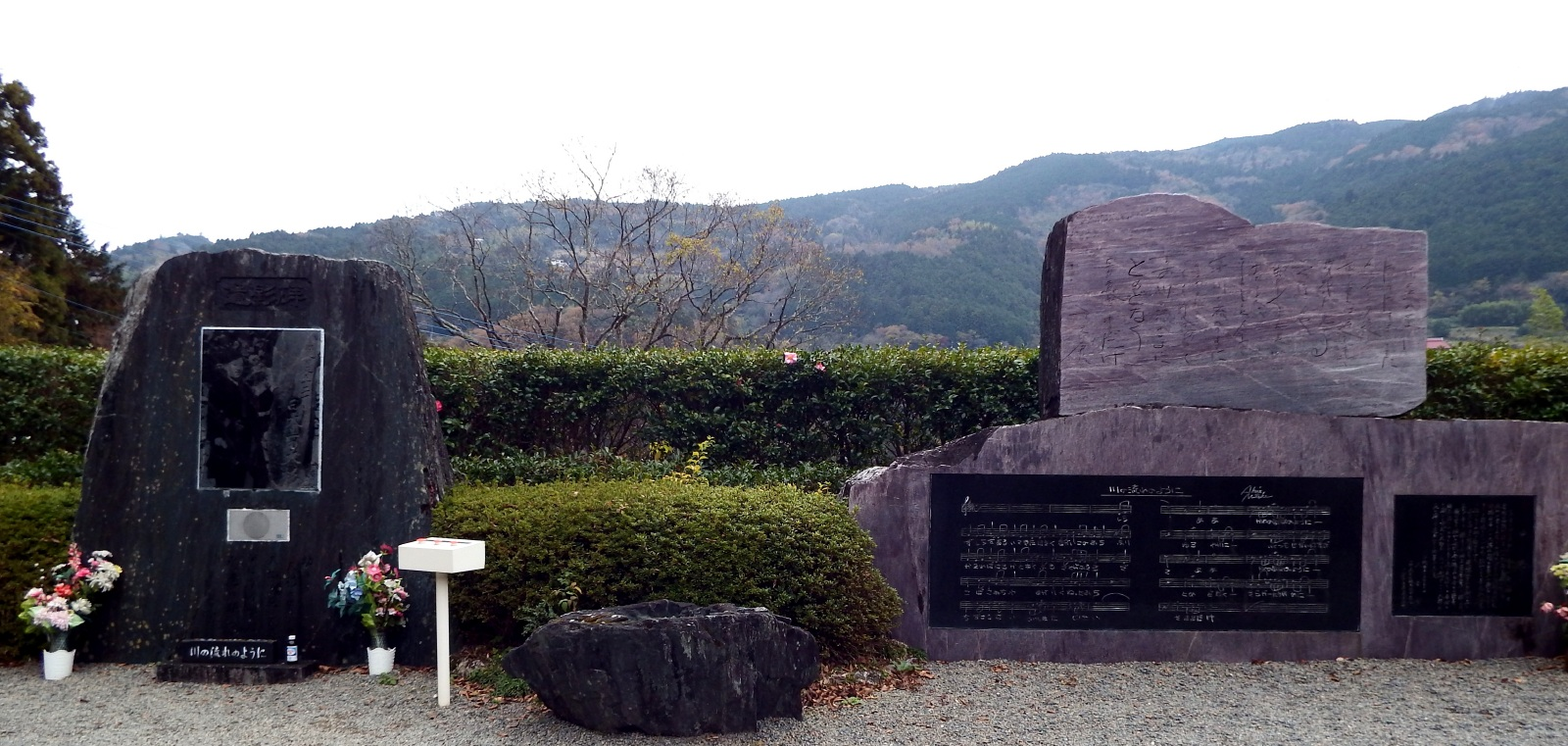 美空ひばりの大杉にある碑